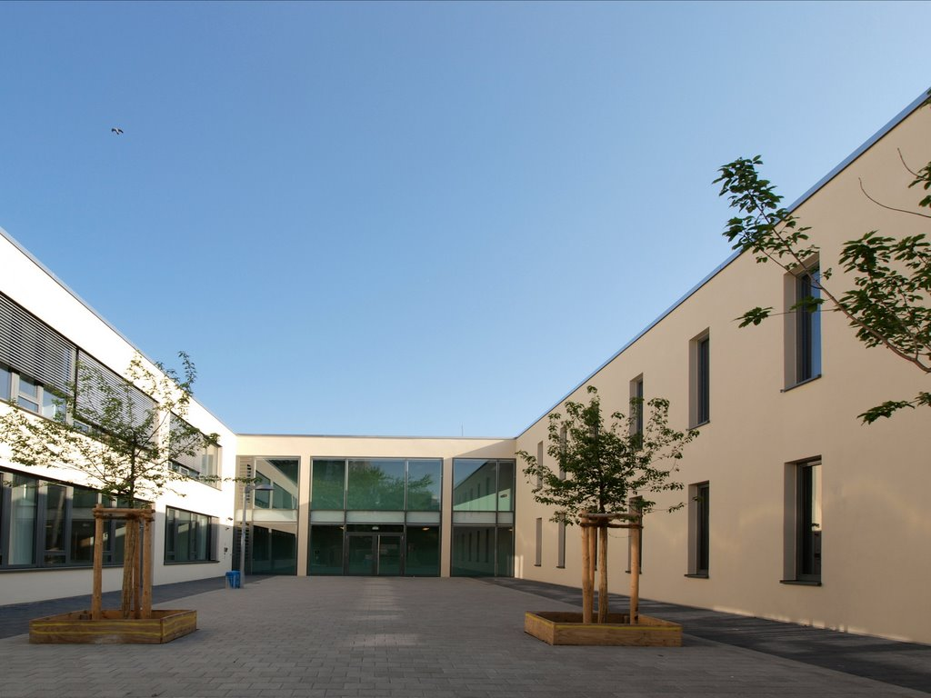 Die 2011 neu eröffnete Vogelstanggrundschule errichtet in Arbeitsgemeinschaft Bilfinger-Berger AG/ED.Züblin AG